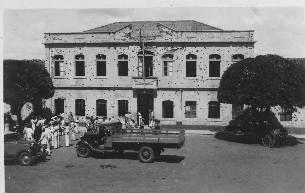 quartel da saldadeira